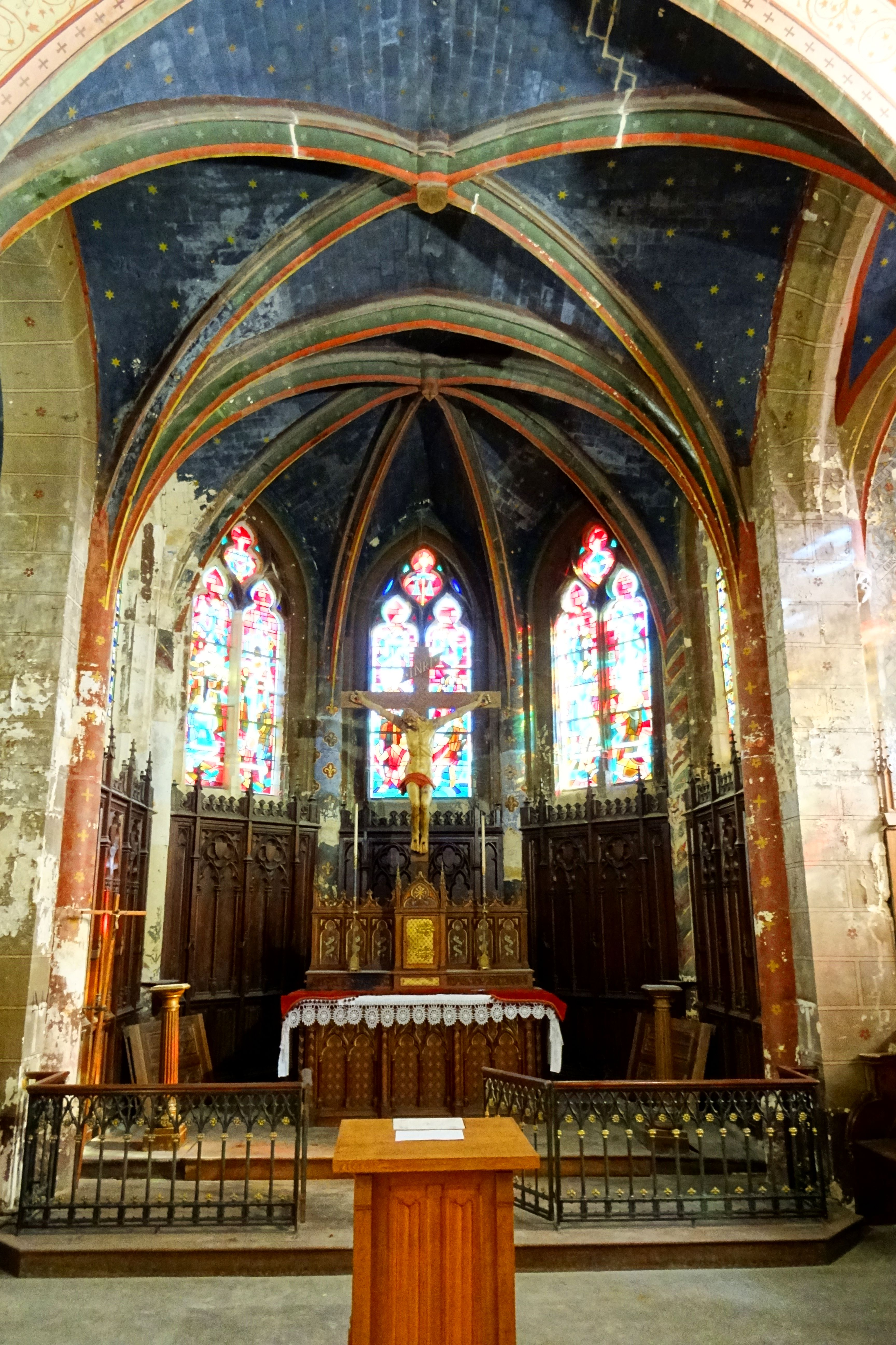 Intérieur de l'église - voir le titre du fichier.